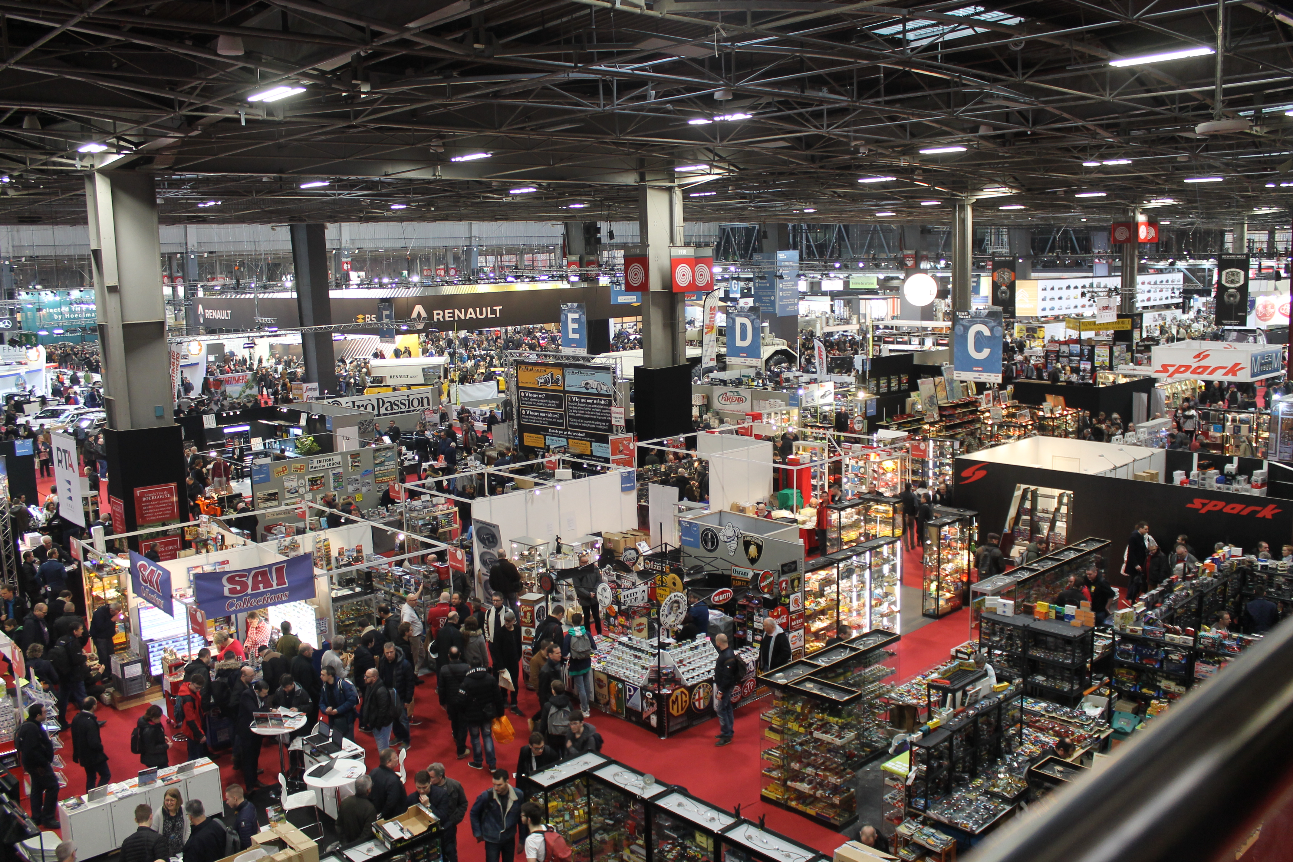 Rétromobile 2019 - Vue générale du Stand 1